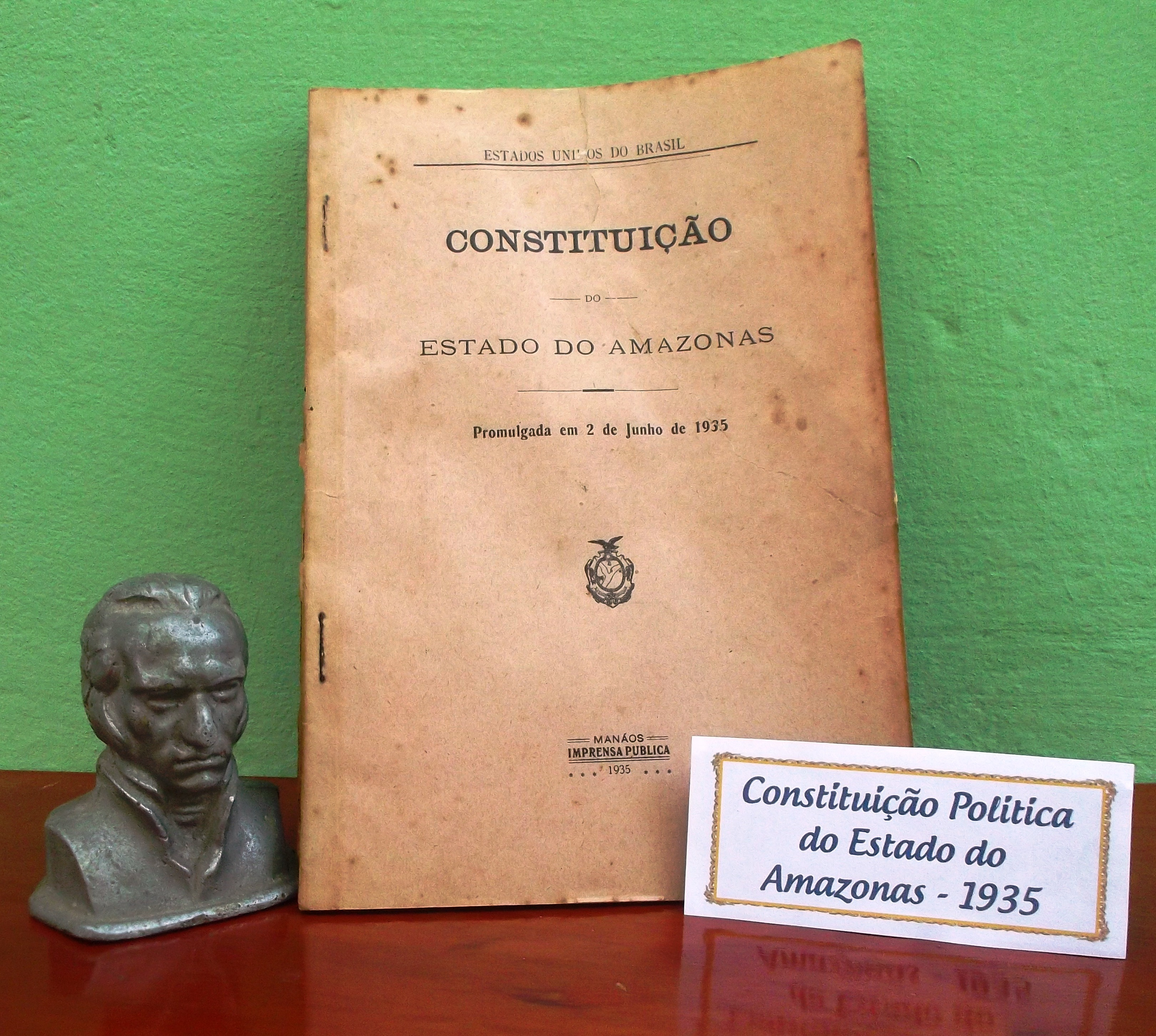 Páginas do texto da Constituição Política do Estado do Amazonas de 1935. O mini busto, ao lado, representa o rosto do militar sulamericano José Articas.